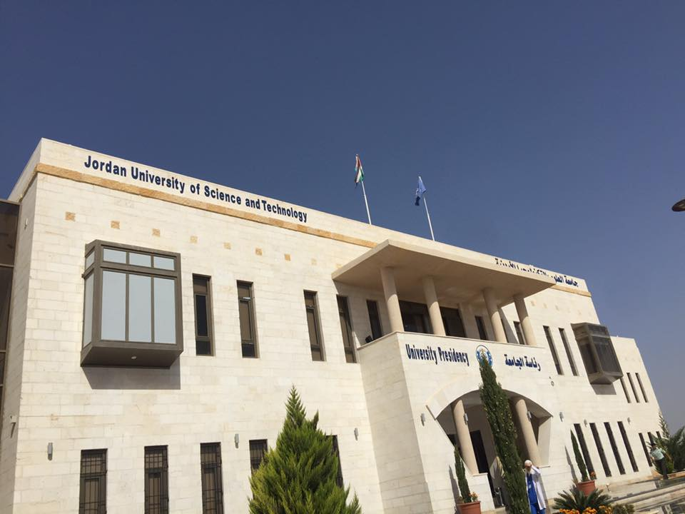 رئاسة جامعة العلوم والتكنولوجيا الاردنية الجديدة